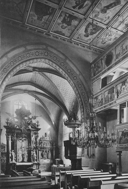 Kirche Leubnitz-Neuostra in Dresden mit Blick zum Altar